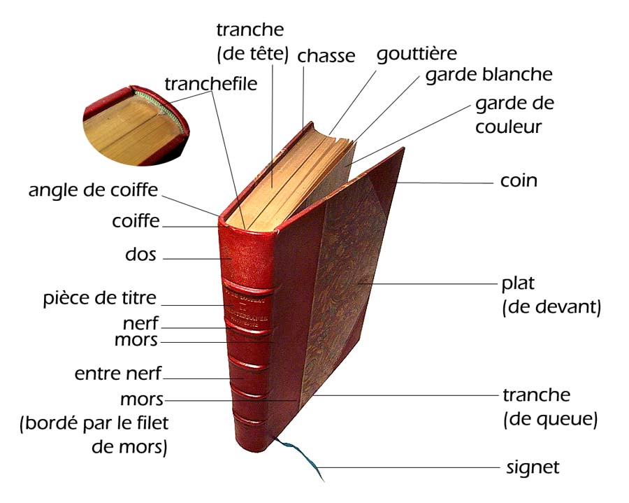 Cette image met en relation le vocabulaire du relieur (et du libraire) et les différents éléments du livre en termes de reliure.